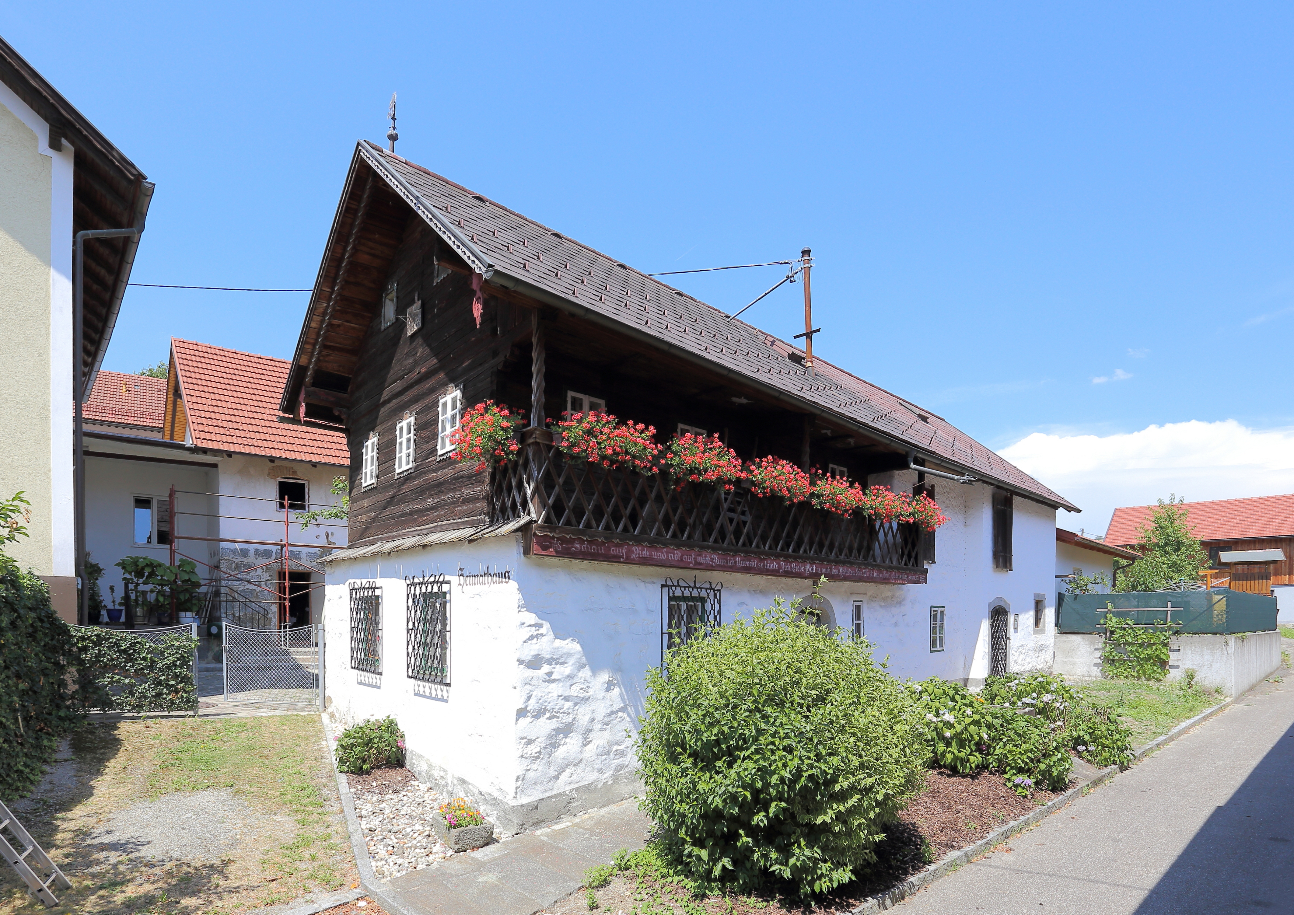 Heimathaus und Museum in der oberösterreichischen Gemeinde Enzenkirchen. Die Einrichtung des Heimathauses "Eichinger" wurde 1993 vom Gemeinderat beschlossen. Ausgestellt werden bemalte Sauwaldmöbel, Bücher aus dem 16. und 17. Jahrhundert sowie eine Mineraliensammlung.